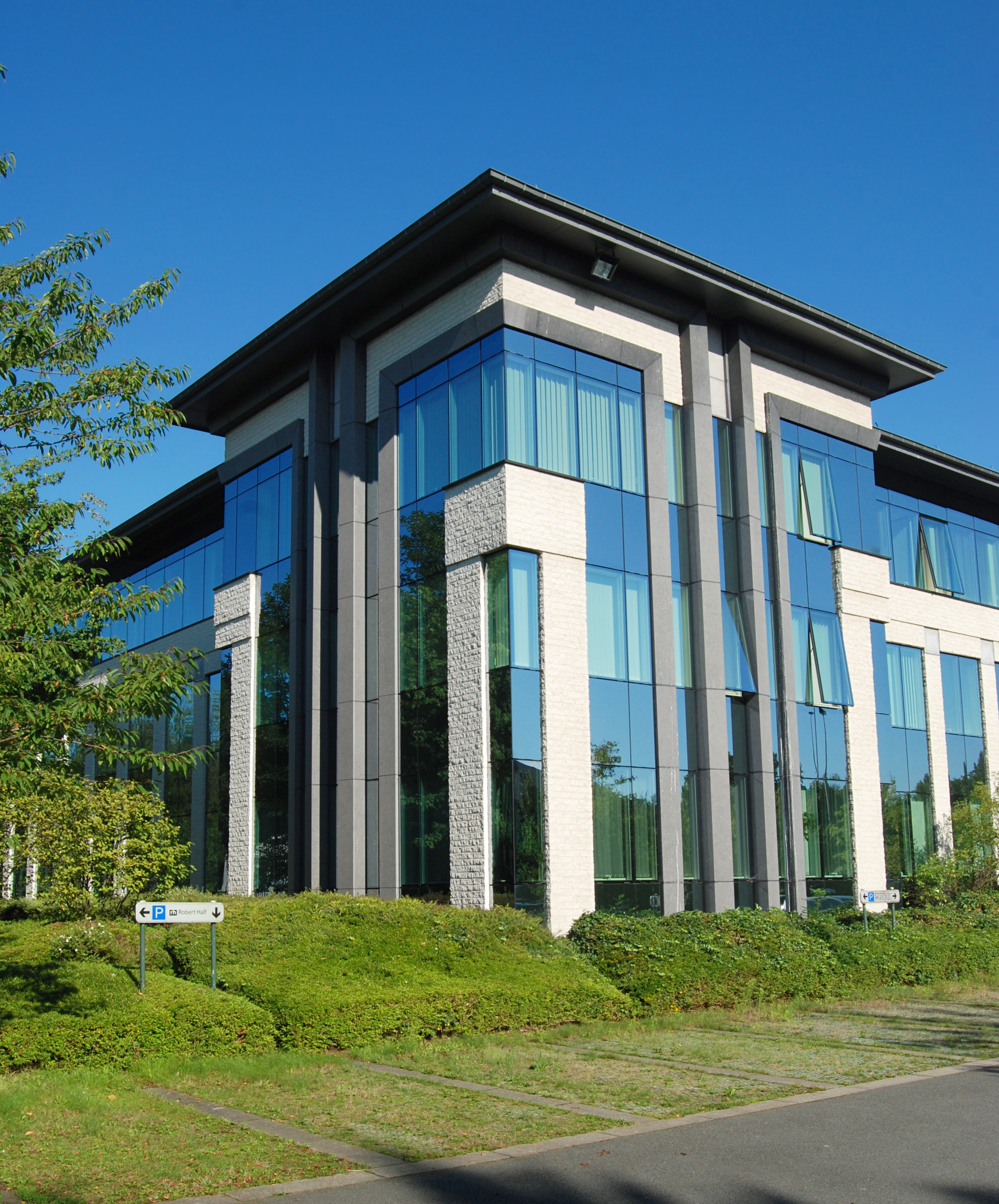 Belgique - Wavre - Parc d’affaires « Les Collines de Wavre » (Architecture postmoderne - Group Sigma Architecture - 1995-2002)